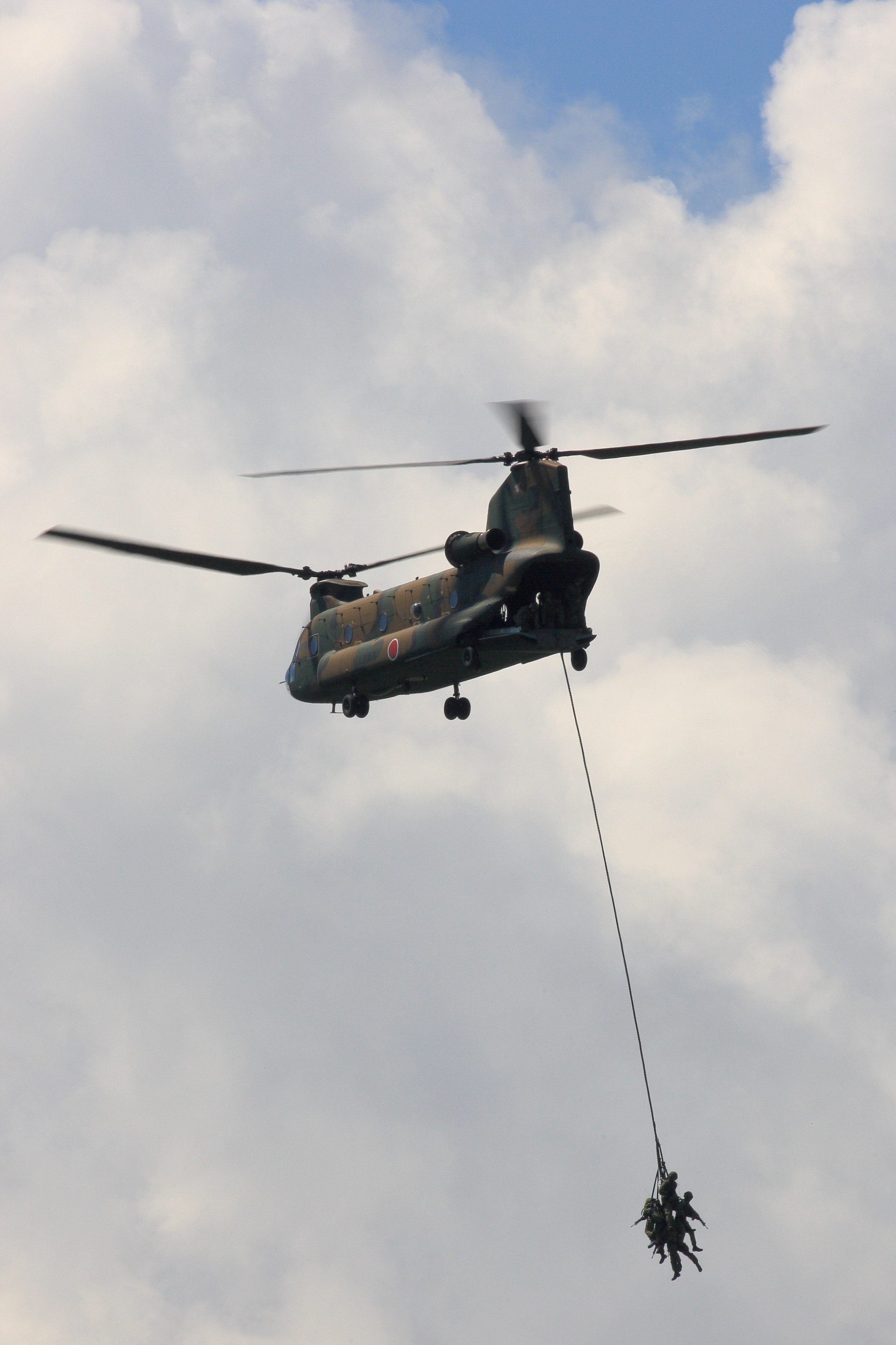 エクストラクションロープを使用した離脱要領。平成22年度富士総合火力演習の前日予行にて。 Canon EOS-1D Mark III